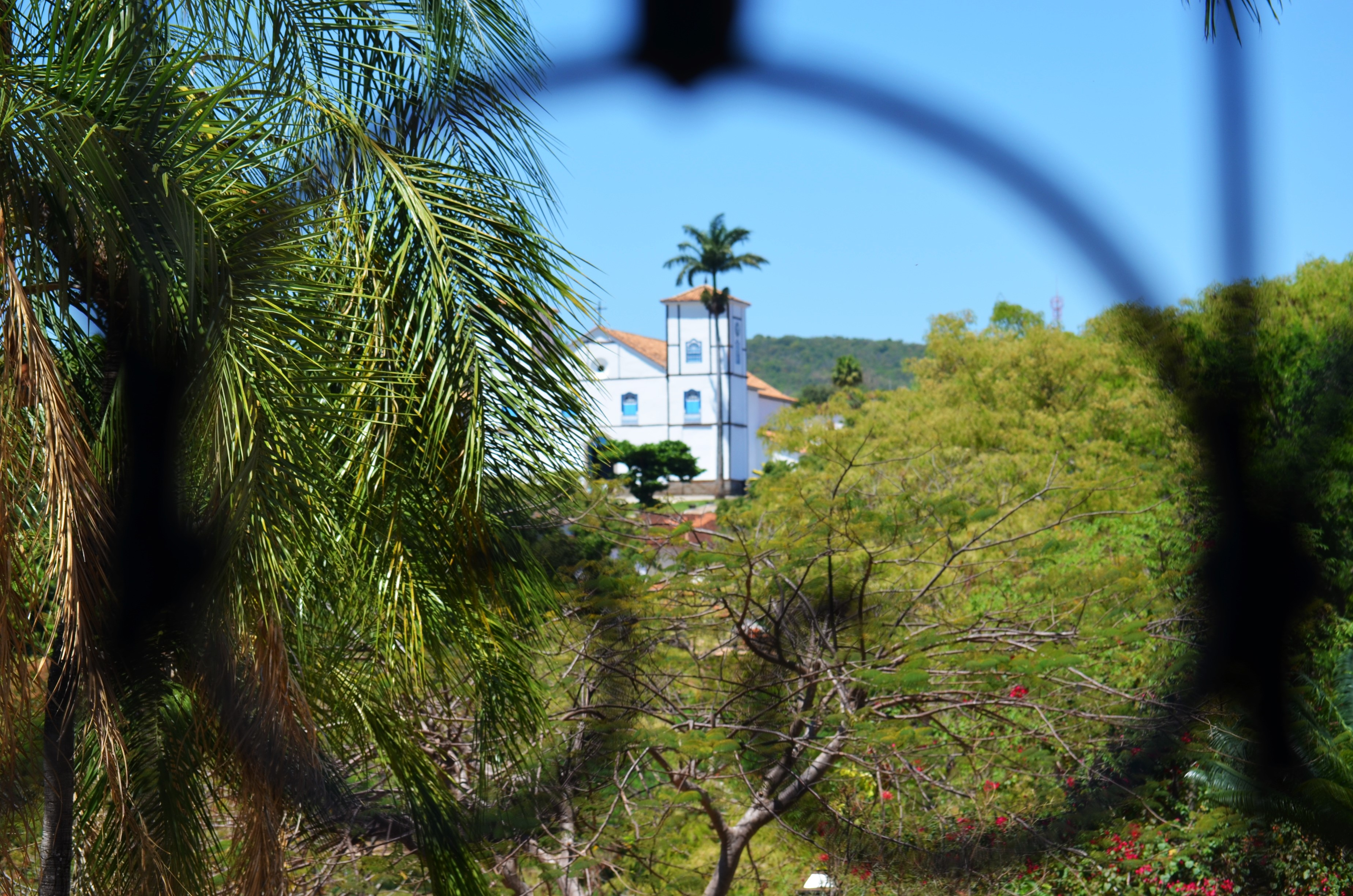 Igreja Matriz de Nossa Senhora do Rosário